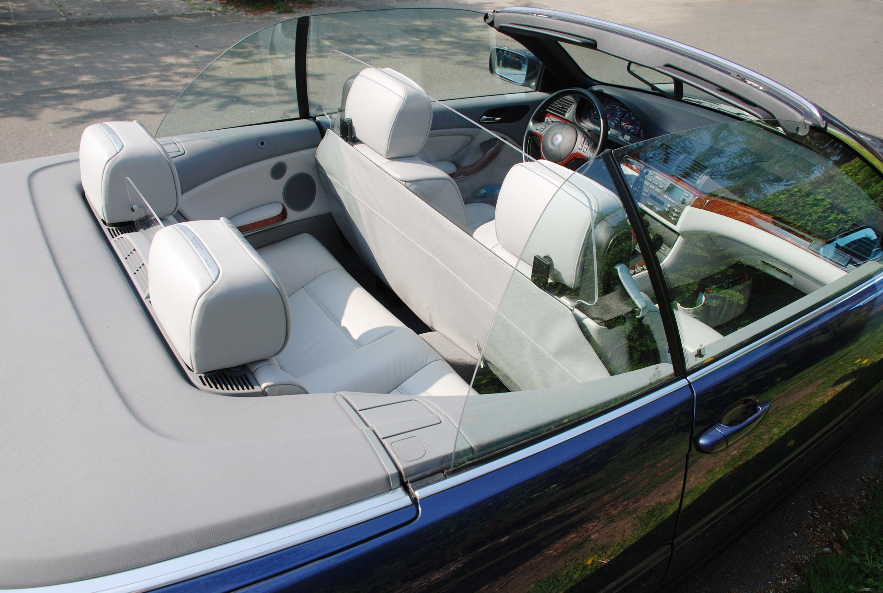 Windschott aus Acrylglas in einem Cabriolet